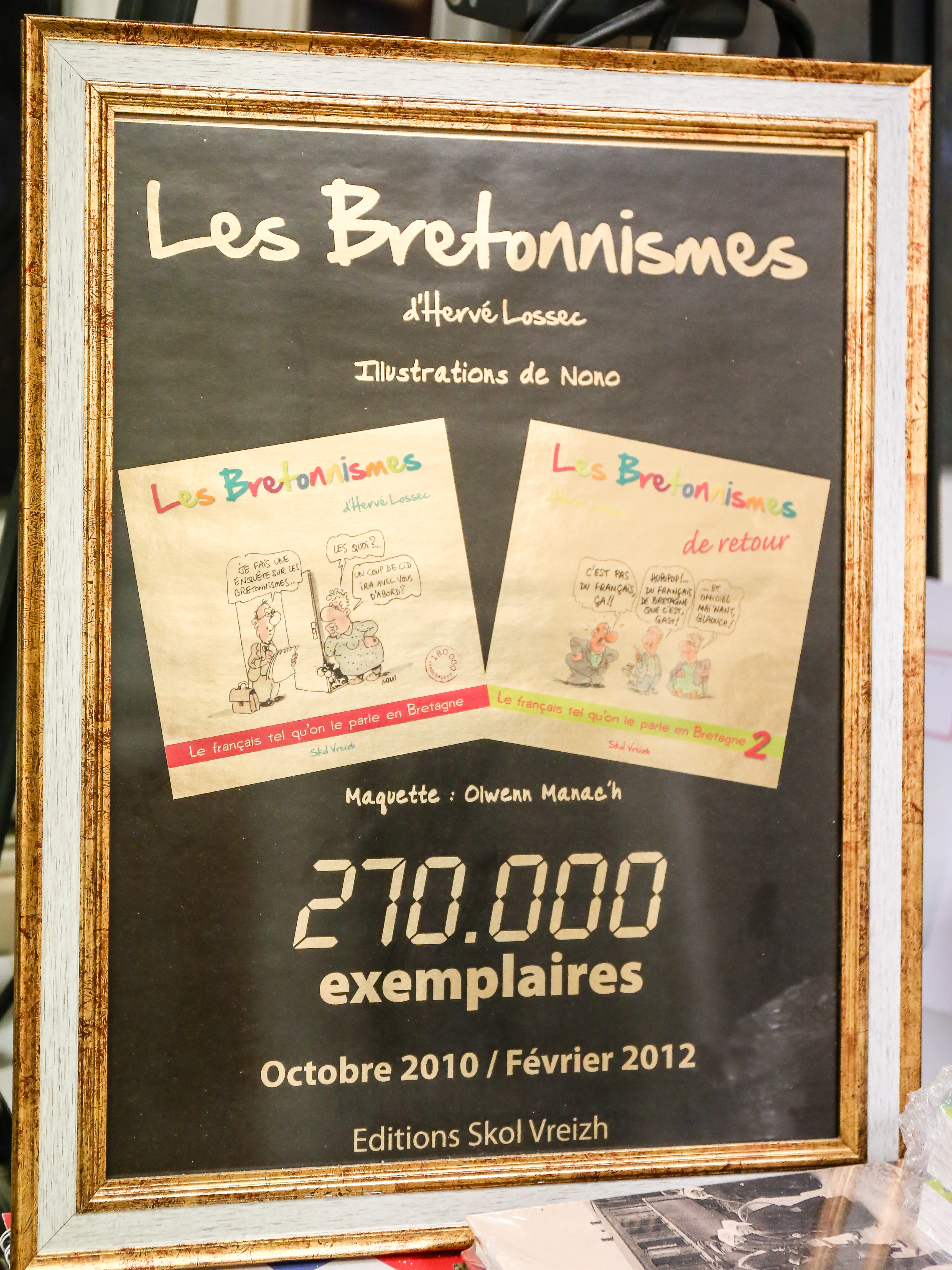 Cadre pour la vente de 270 000 exemplaires des 2 tomes "Les Bretonnismes" d'Hervé Lossec aux éditions Skol Vreizh (Morlaix).